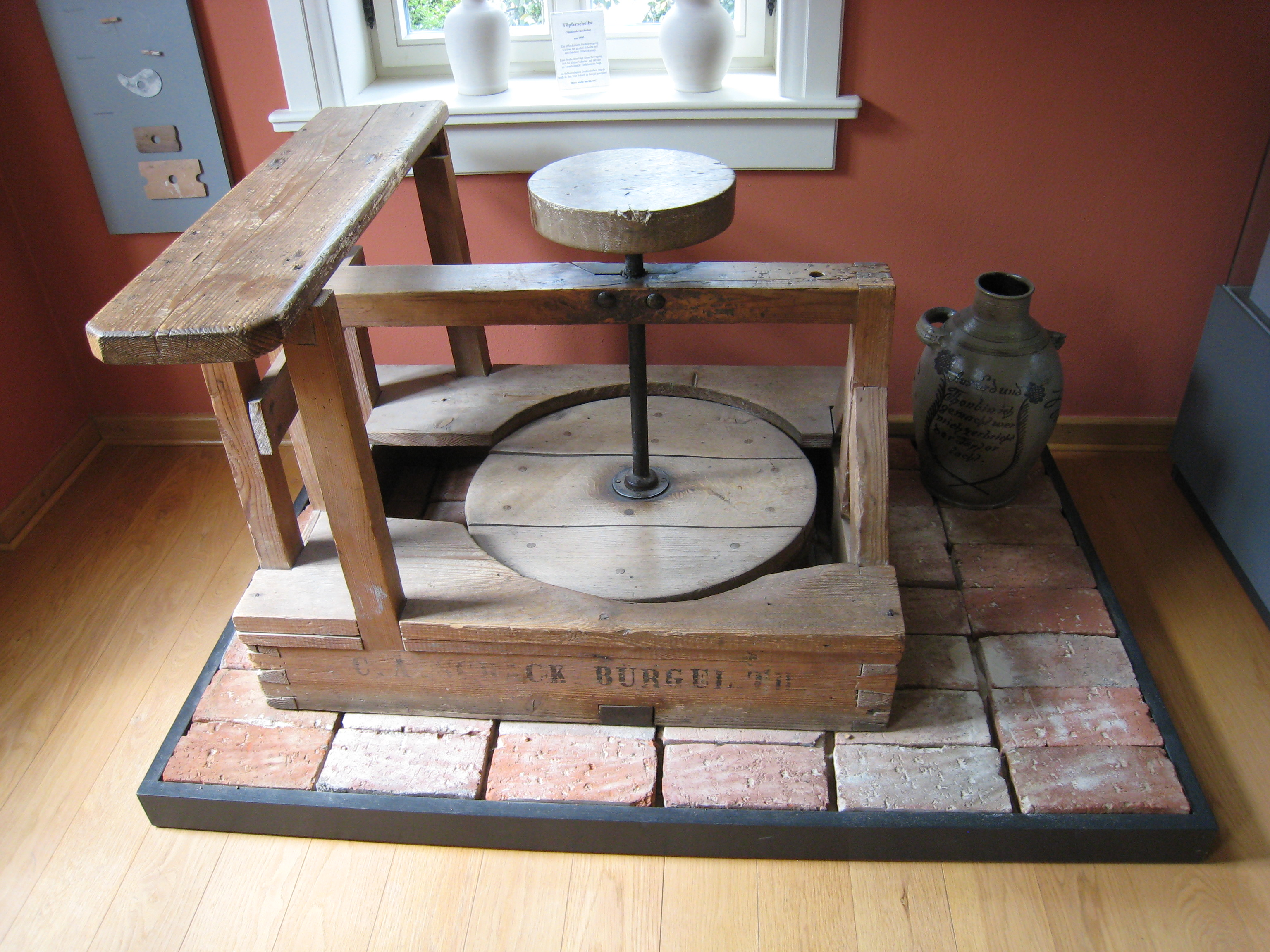 Keramikmuseum Bürgel 1